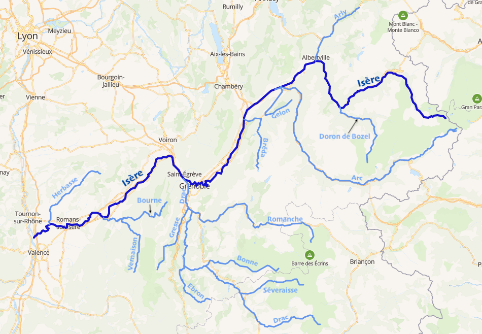 carte réalisée sur umap This map may be incomplete, and may contain errors. Don't rely solely on it for navigation.